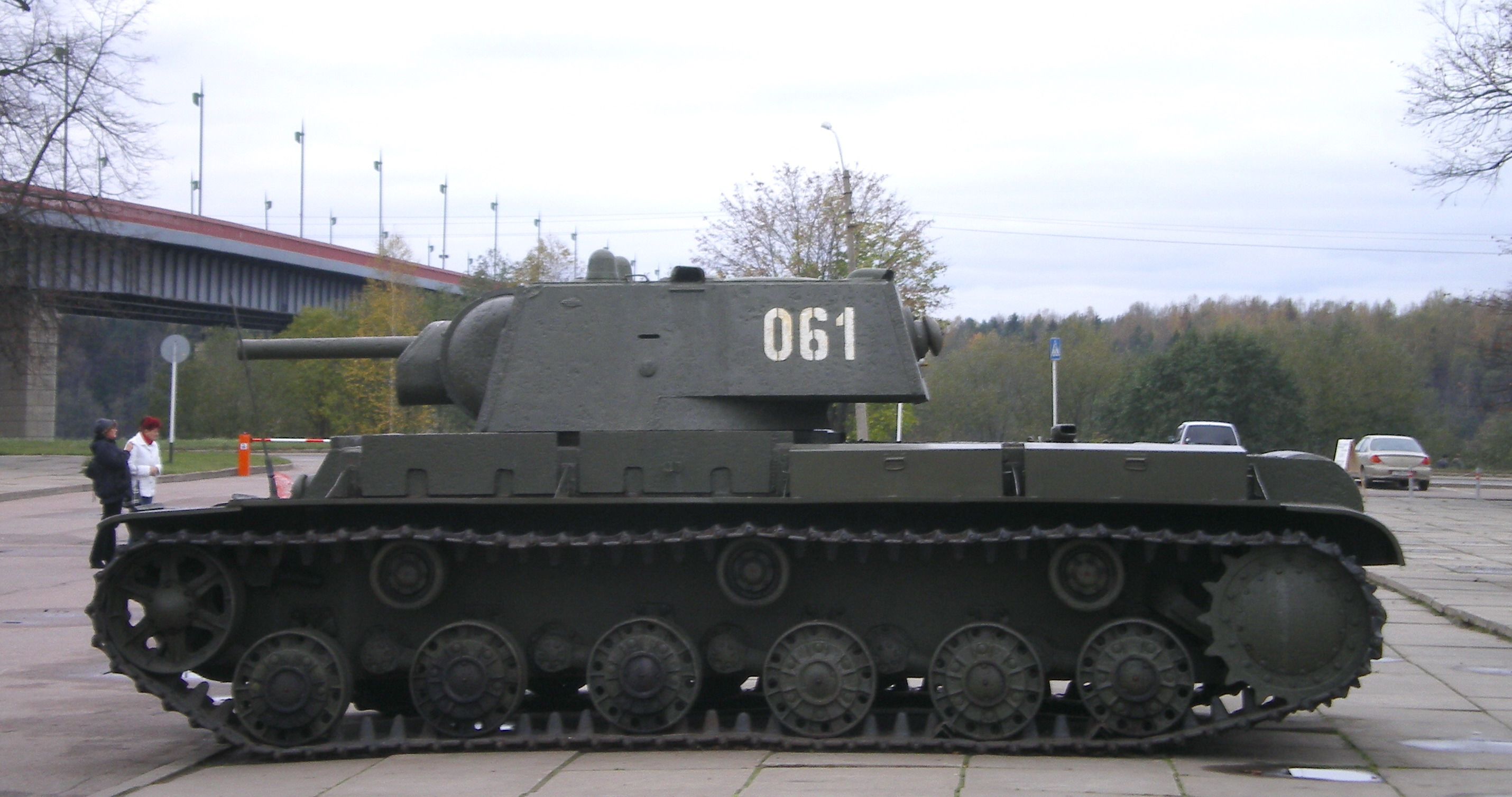 Диорама «Прорыв блокады Ленинграда». Экспозиция военной техники периода 1941–1944 годов под открытым небом. Танк КВ-1. Вид слева.